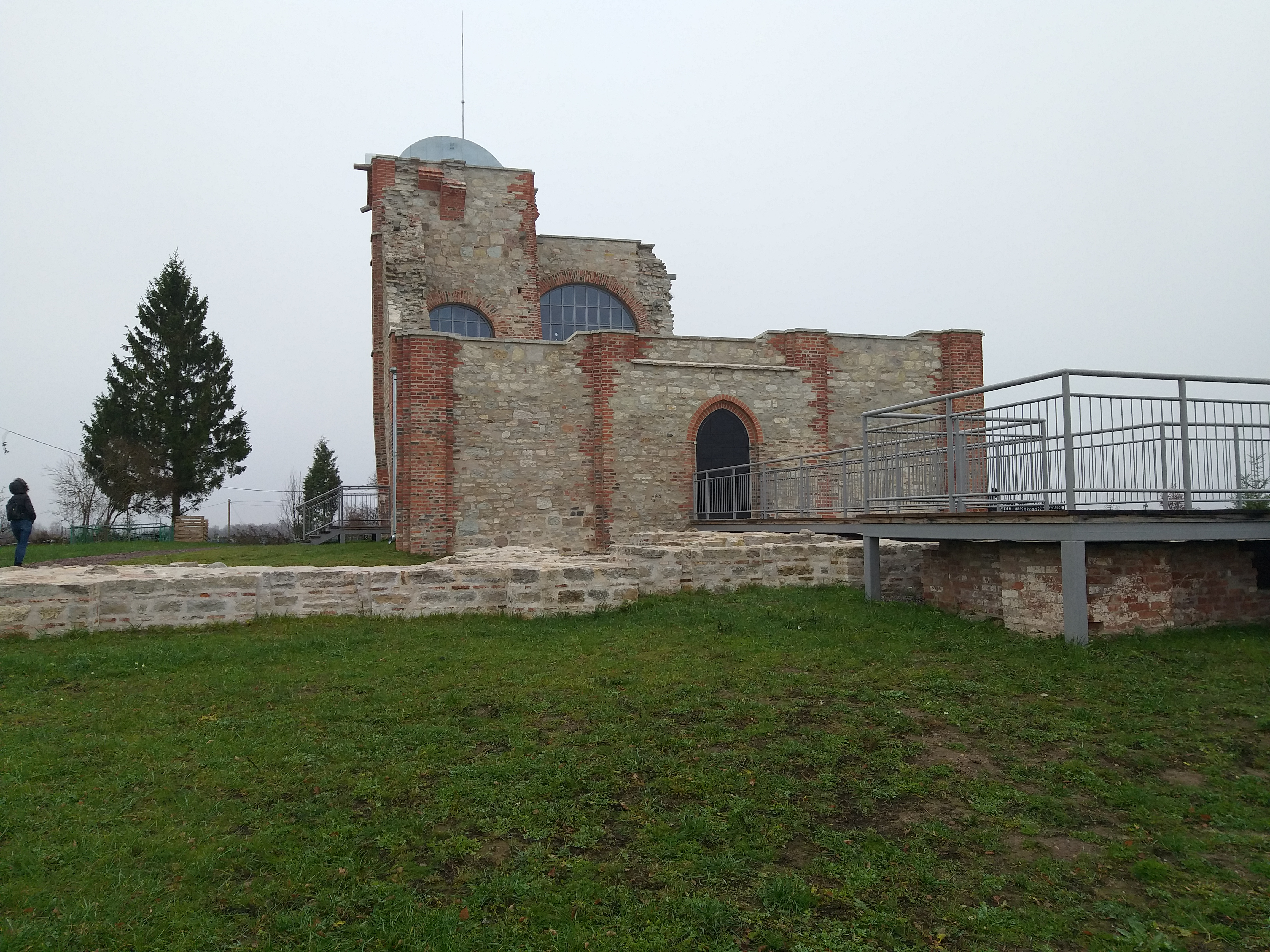 Церковь Благовещения после консервации в 2018 году